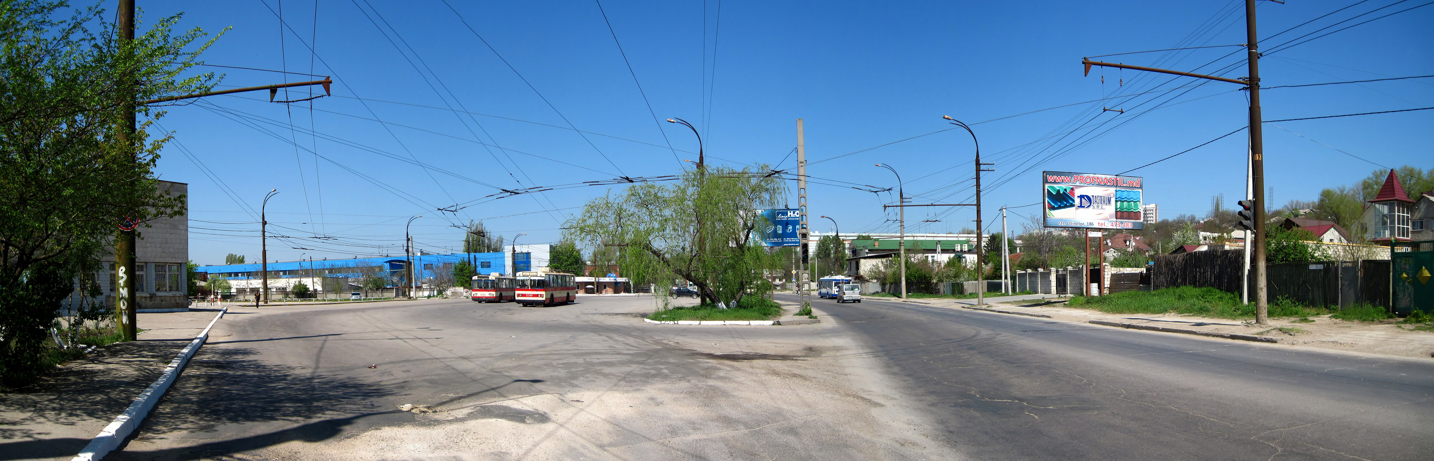 Sectorul Ciocana, Chisinau, Moldova